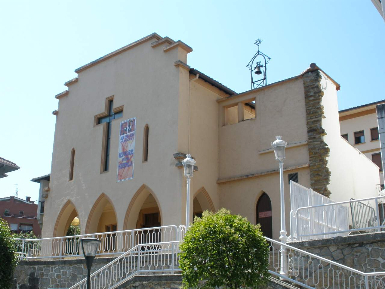 Capilla de la Virgen de la Milagrosa (Urretxu)